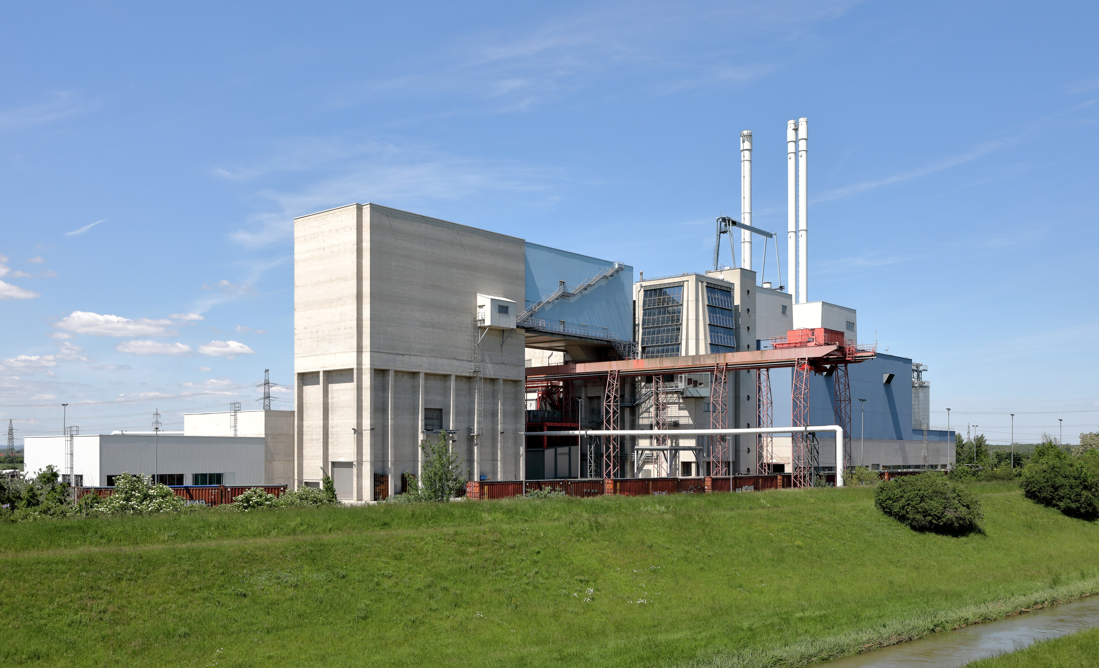 Südansicht der Müllverbrennungsanlage in Dürnrohr, ein Ortsteil der niederösterreichische Marktgemeinde Zwentendorf an der Donau.Von 2001 bis 2003 wurden die ersten zwei Linien (2 x 60 MW) der Müllverbrennungsanlage errichtet und im Jahr 2010 wurde eine dritte Linie (1 x 90 MW) in Betrieb genommen. Dadurch erhöhte sich die Kapazität der Anlage auf mehr als 500.000 t pro Jahr. Der in der Abfallverwertungsanlage erzeugte Dampf wird in das benachbarte Kraftwerk Dürnrohr geleitet und dort zur Erzeugung von Strom für 170.000 Haushalte, Fernwärme für die Gemeinde Zwentendorf und die Stadt St. Pölten sowie Prozessdampf für die AGRANA Bioethanolanlage genutzt.